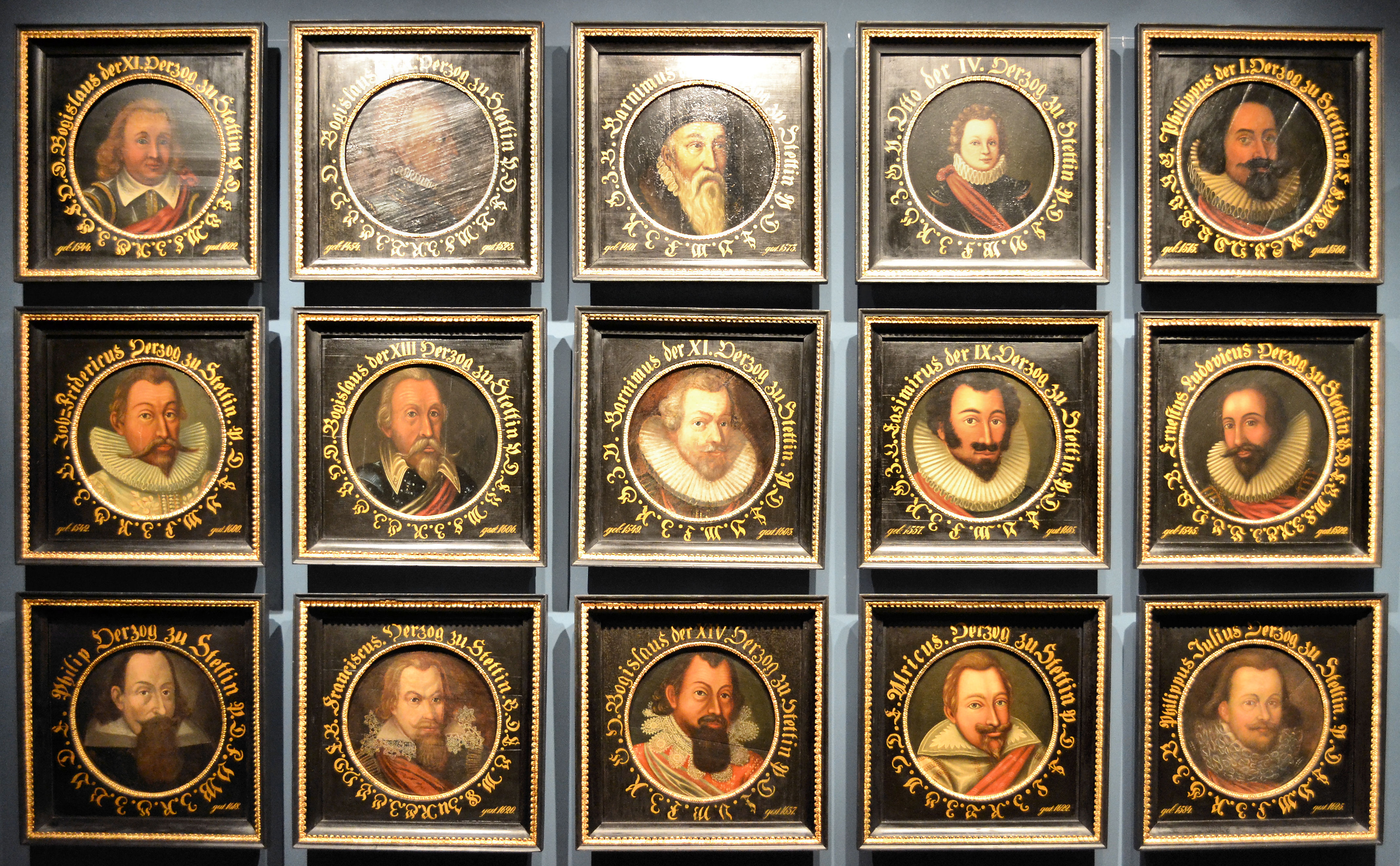 Portrety ksiazat pomorskich, autor nieznany, 1678 r. Zdobily gmach gieldy w Szczecinie, obecnie eksponaty Muzeum Narodowego w Szczecinie